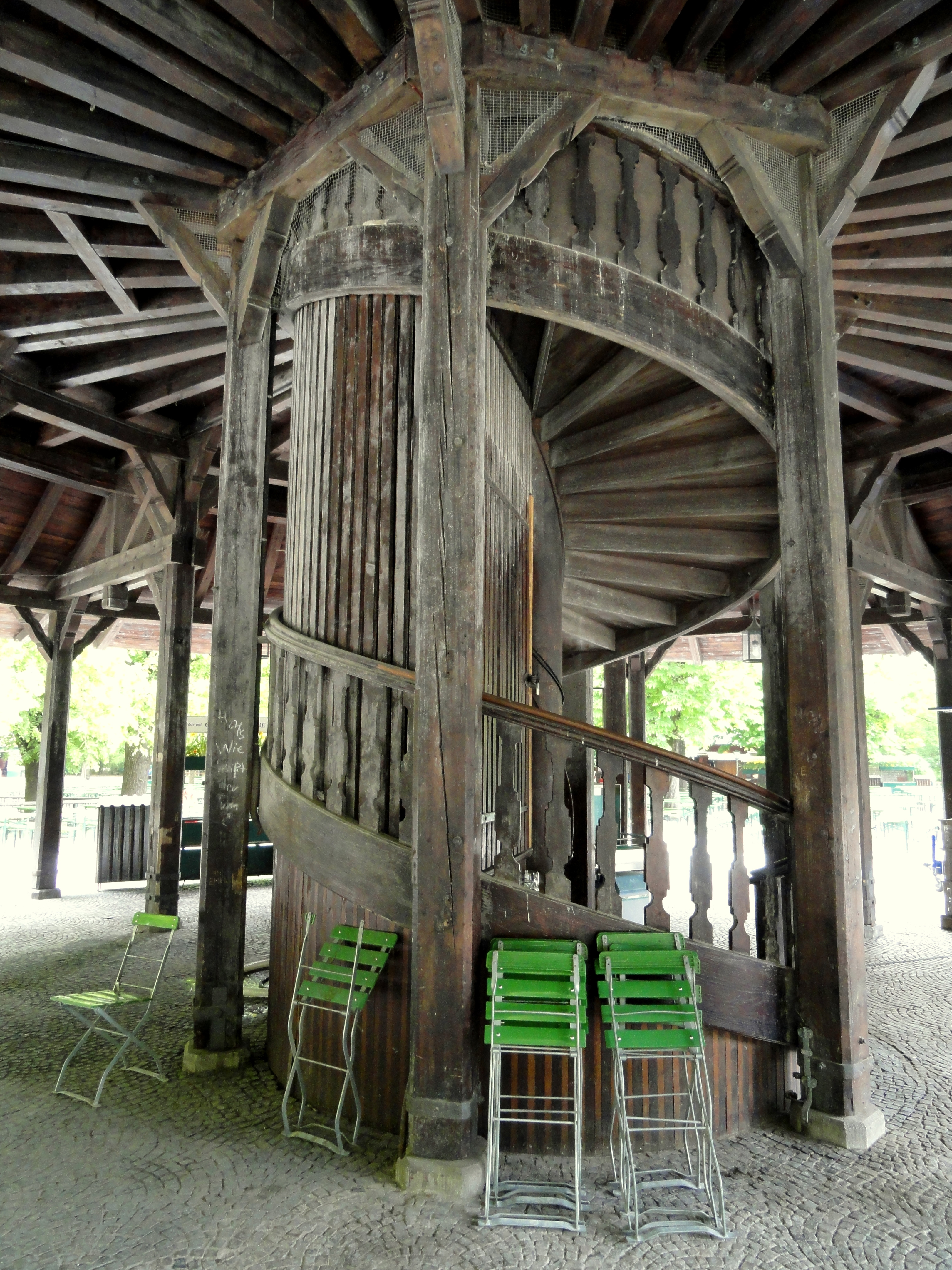 Chinesischer Turm in Englischer Garten, Munich, Germany. Built 1789-1790 by architect Johann Baptist Lechner (1758–1809) after draft plans by Joseph Frey.